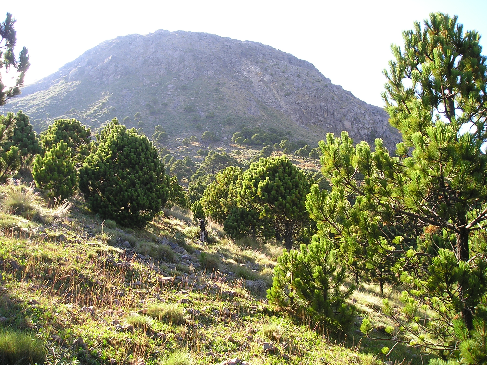 Volcán Tajumulco, San Marcos, Guatemala. Trees are Pinus hartwegii.